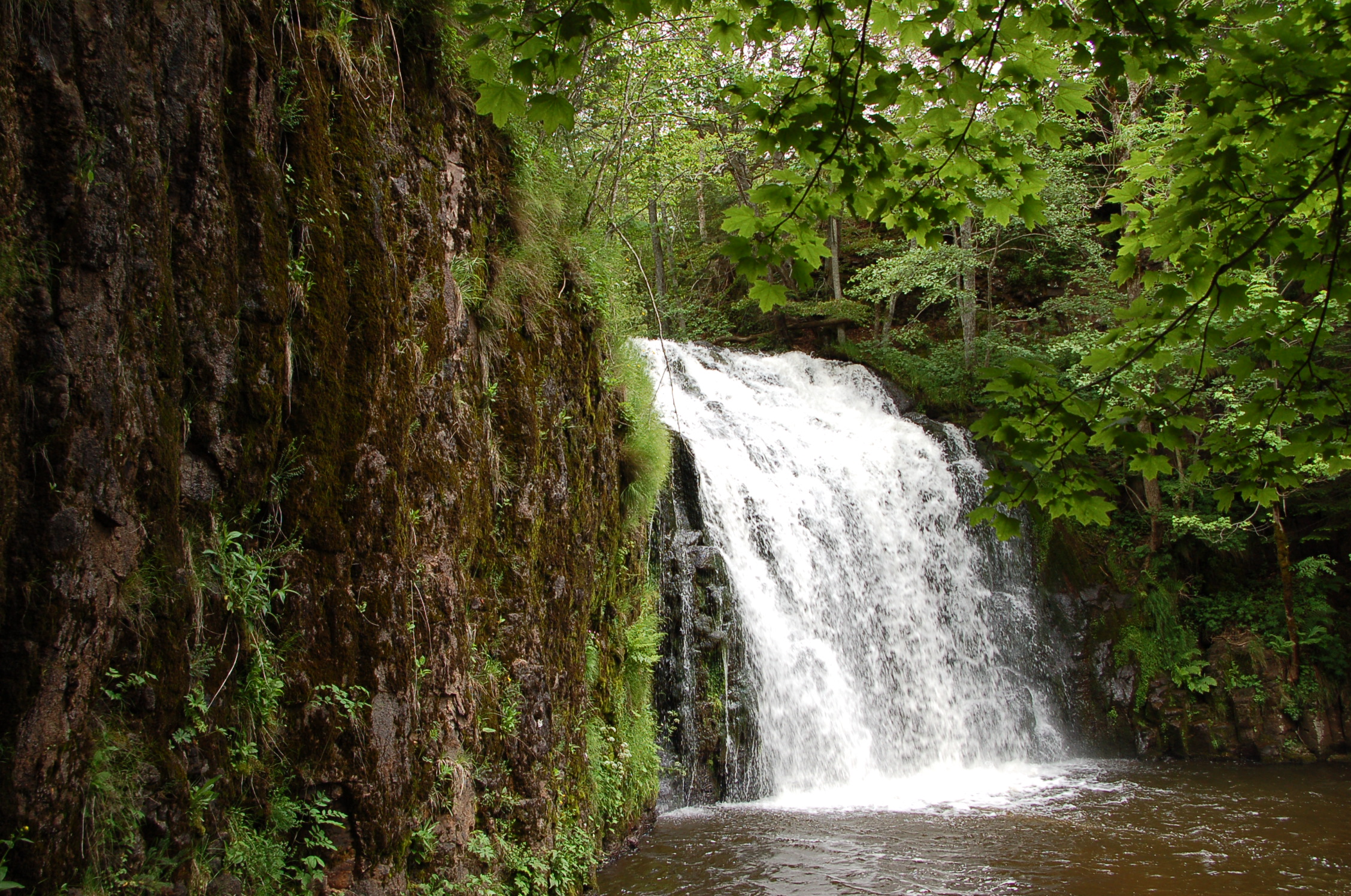 Rhue: Wasserfall „Bois Chaux“ bei Égliseneuve-d’Entraigues